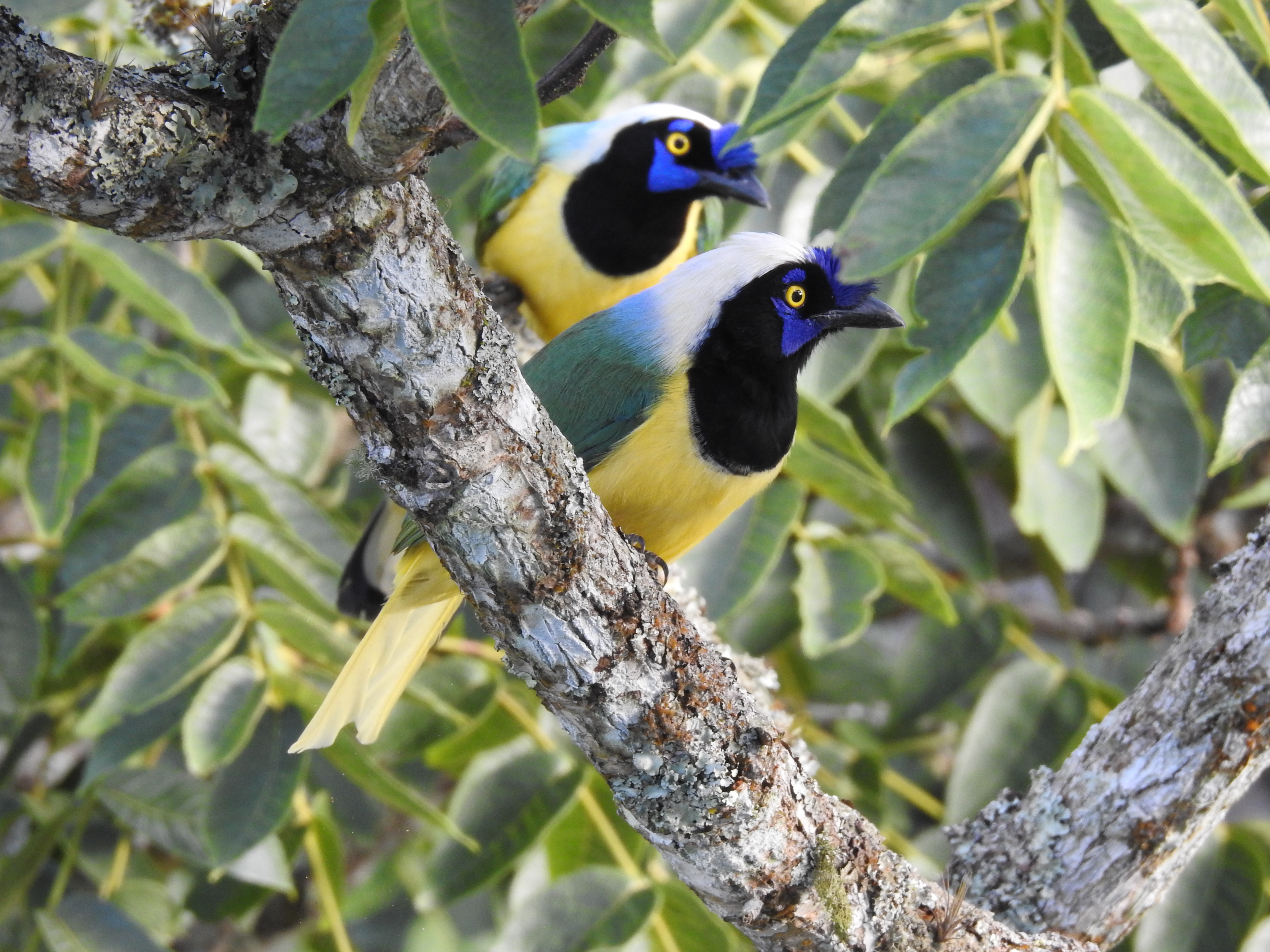 Foto tomada en La Cumbre, Valle del Cauca, Colombia